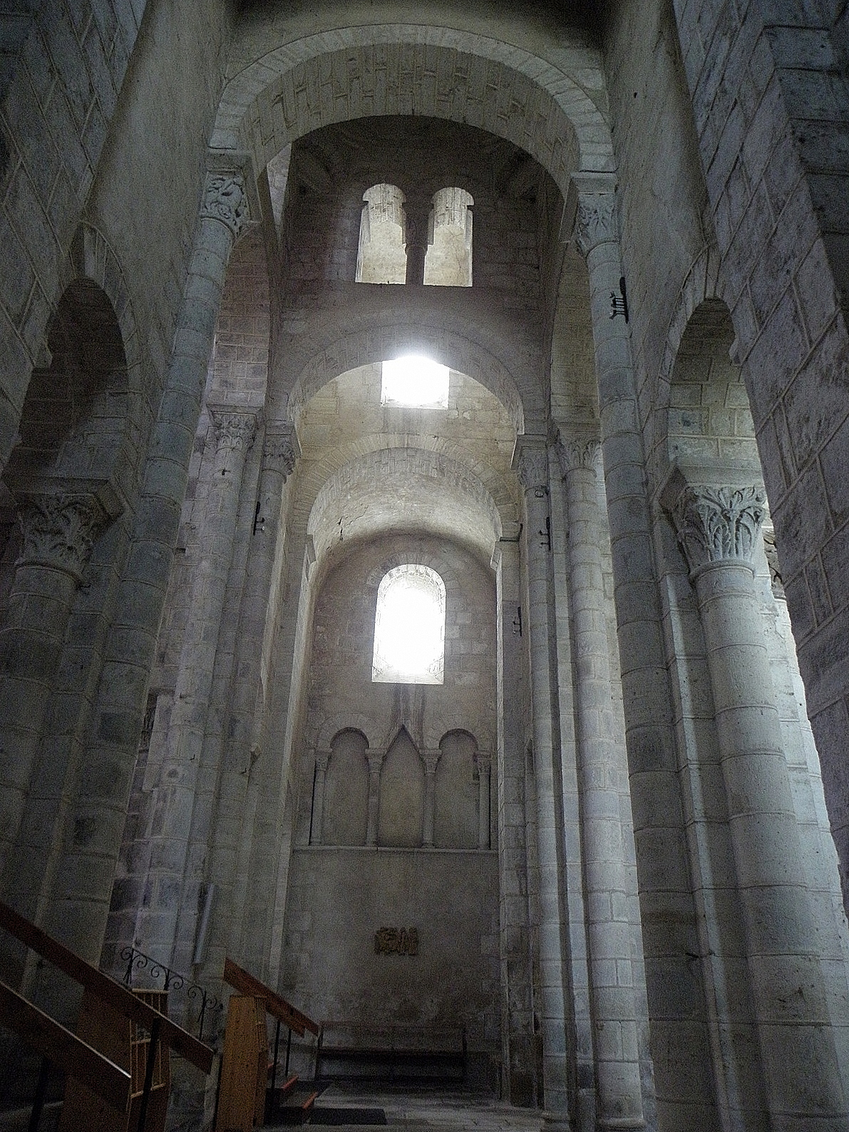 Transept de la collégiale Saint-Victor et Sainte-Couronne d'Ennezat (63). Il est orné d'un triplet de baies aveugles comportant un arc en mitre entouré de deux arcs en plein-cintre. .